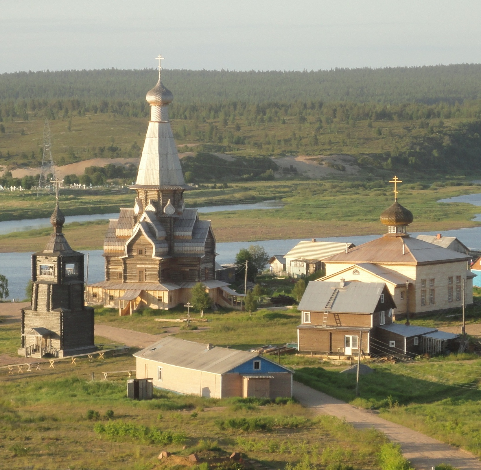 Успенская церковь (Мурманская область, Кандалакша, село Варзуга, Успенская улица, 37)